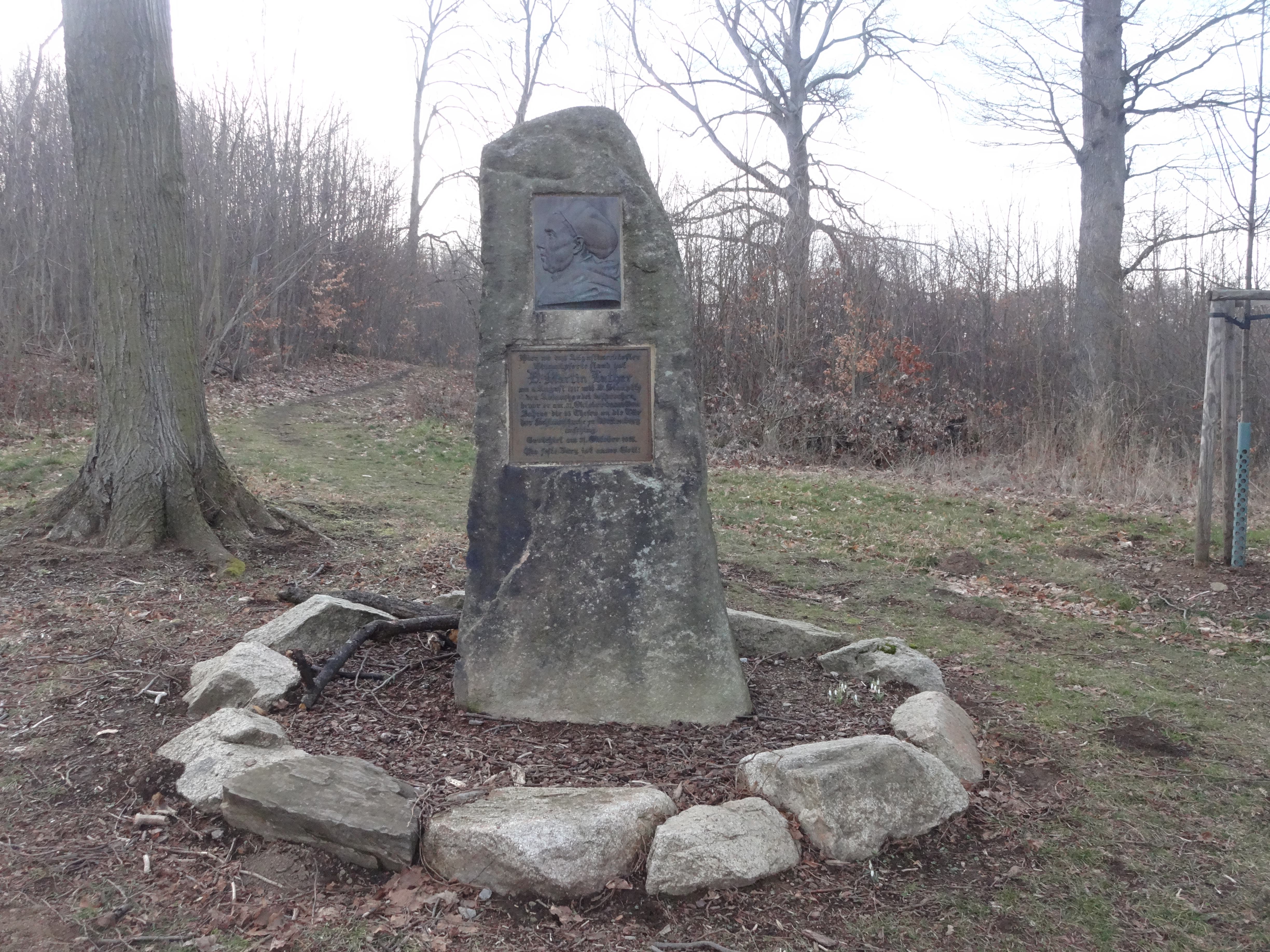 ehemals denkmalgeschützter Lutherstein in Himmelpforte Wernigerode